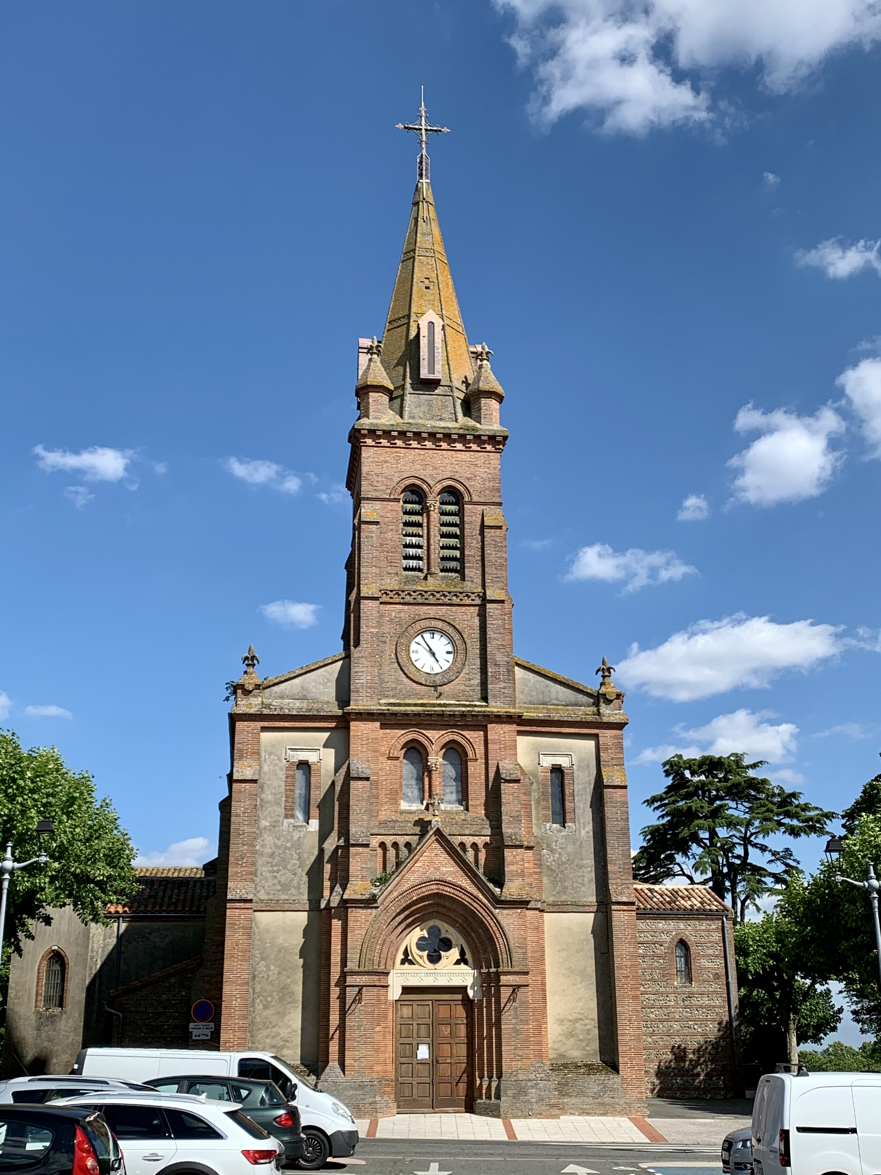 Église Saint-Jean-Baptiste de Fonsorbes, Haute-Garonne